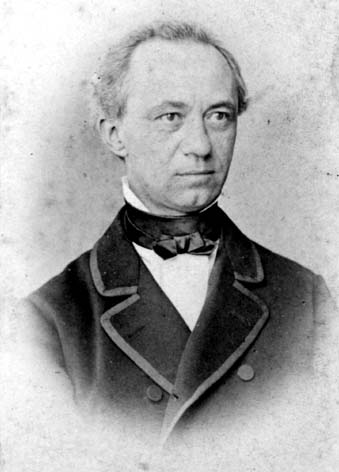 Conrad von Bolanden, Priesterschriftsteller, Speyer